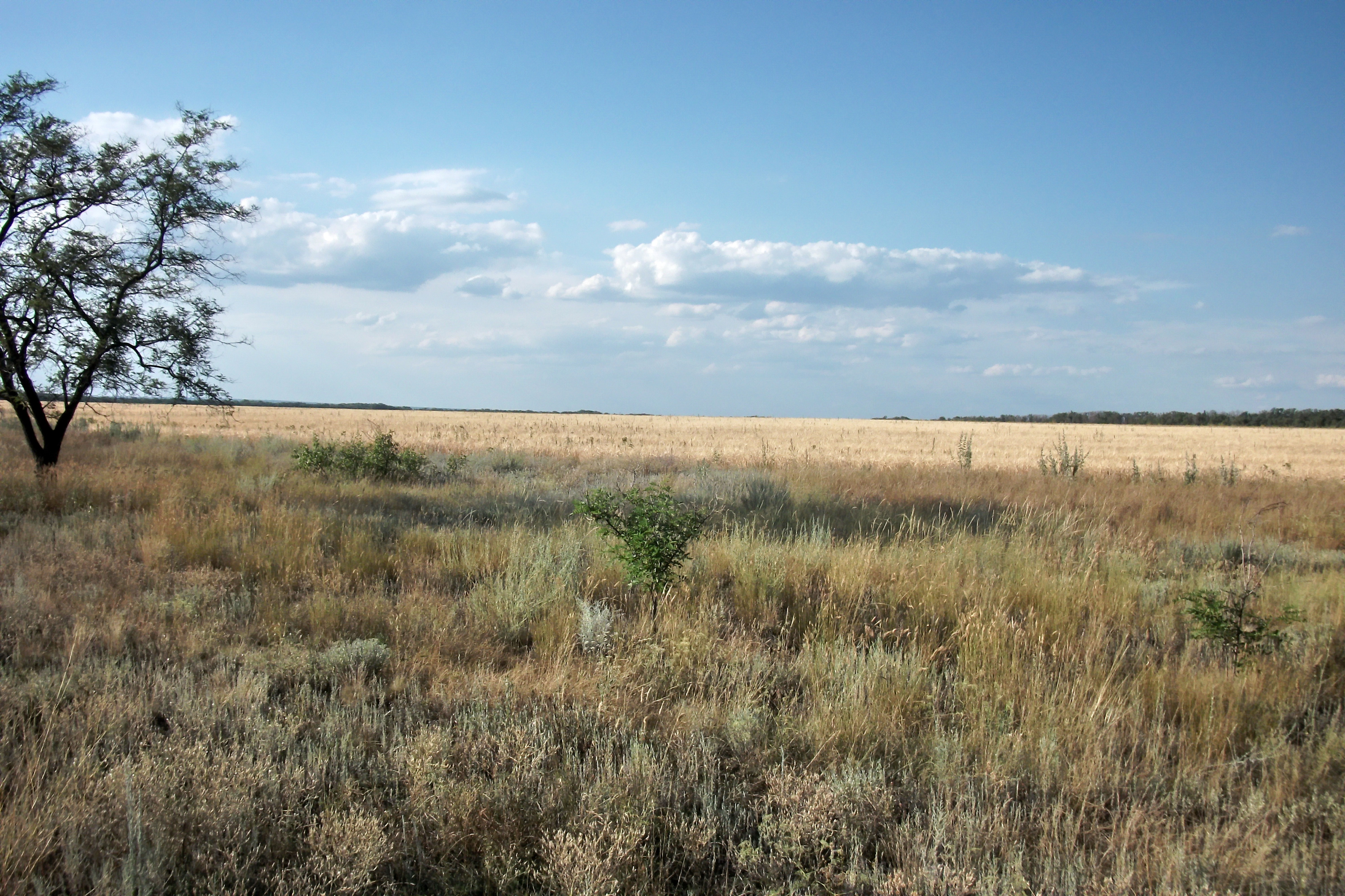 Volgodonskoy District, Rostov Oblast, Russia